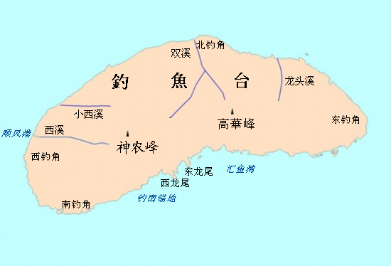 钓鱼岛山川河岳地形图